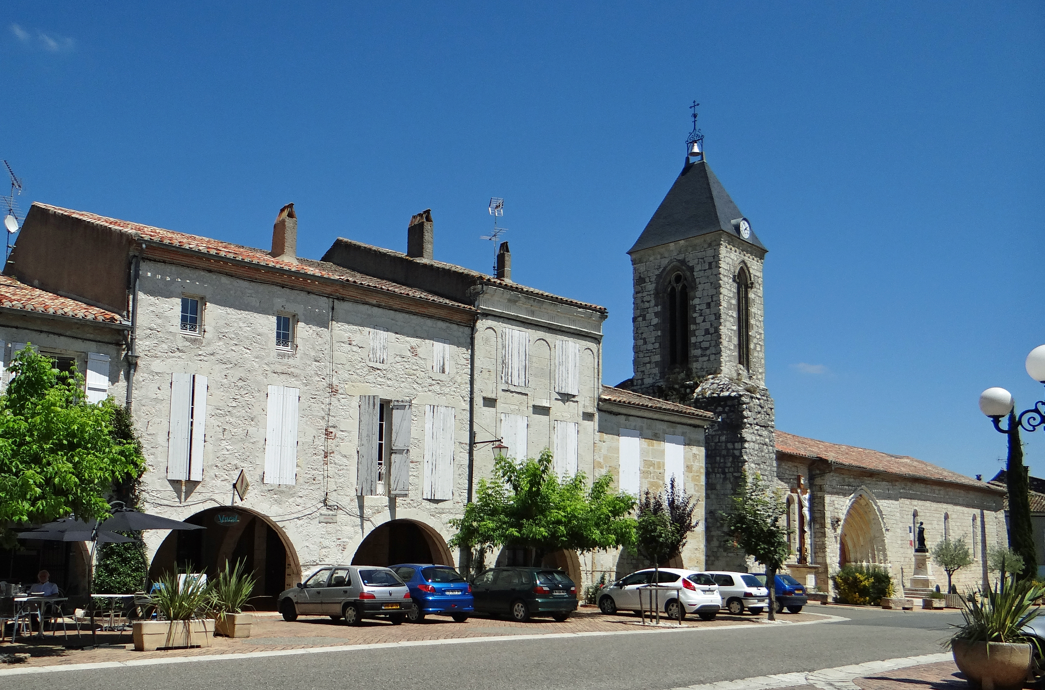 Puymirol - Rue Royale face à la place du Maréchal Leclerc et l'église